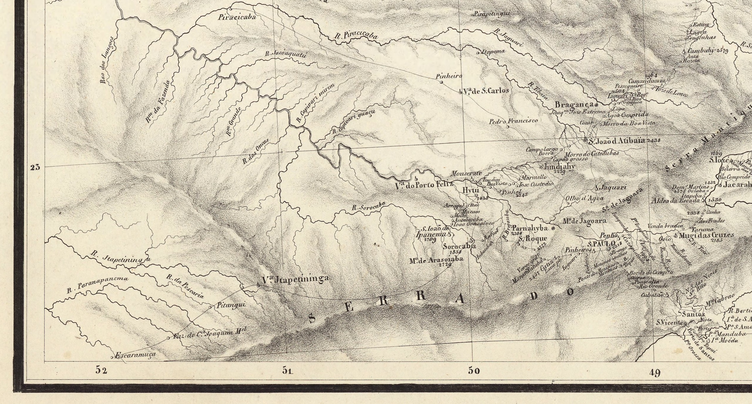 ESCHWEGE, Guill. de; MARTIUS, Ch. Fr. Ph. de; SCHWARZMANN, I. Karte von Ostbrasilien: carte géographique de la partie orientale de l’empire du Brésil en quatre feuilles contenant les provinces maritimes de Pernambuco jusqu’à Rio de Janeiro, celle de Minas Geraës, et une partie des provinces limitrophes, redigée d’après leurs propres observations et les cartes les plus exactes, et dediée a S. M. Don Pedro Empereur du Brésil par […]. Munich, 1831. Mapa 4 (canto inferior esquerdo).